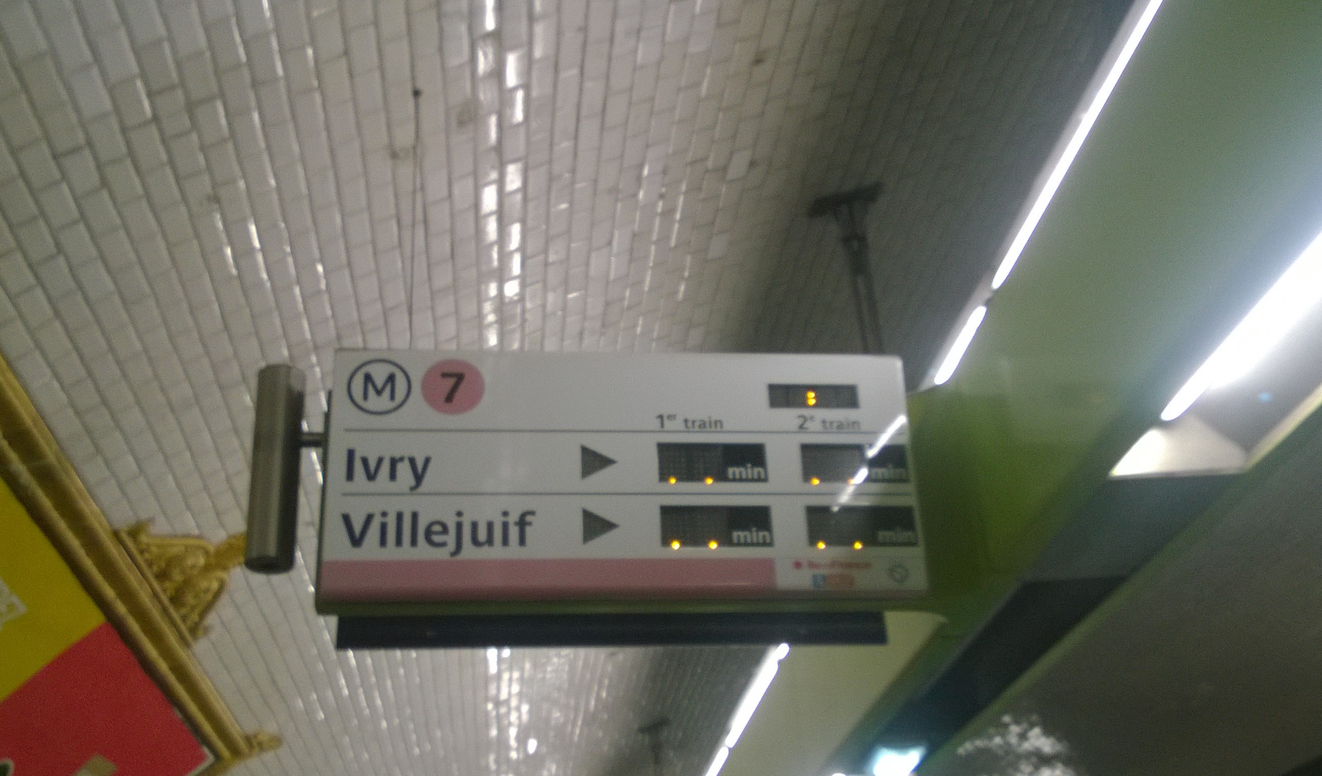 Un SIEL défectueux affichant ".."